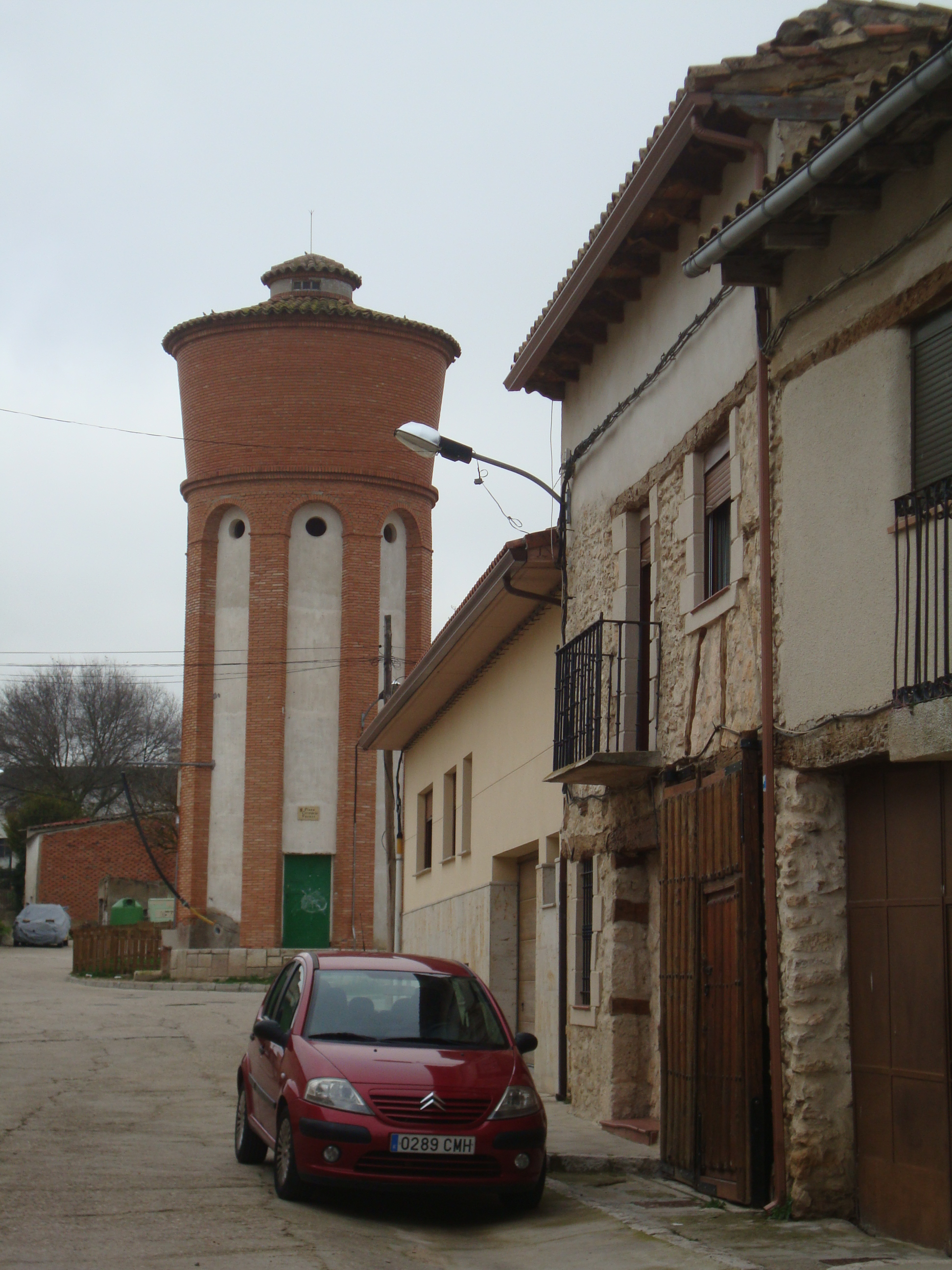 Depósito de agua en la localidad de Ciguñuela (Valladolid).